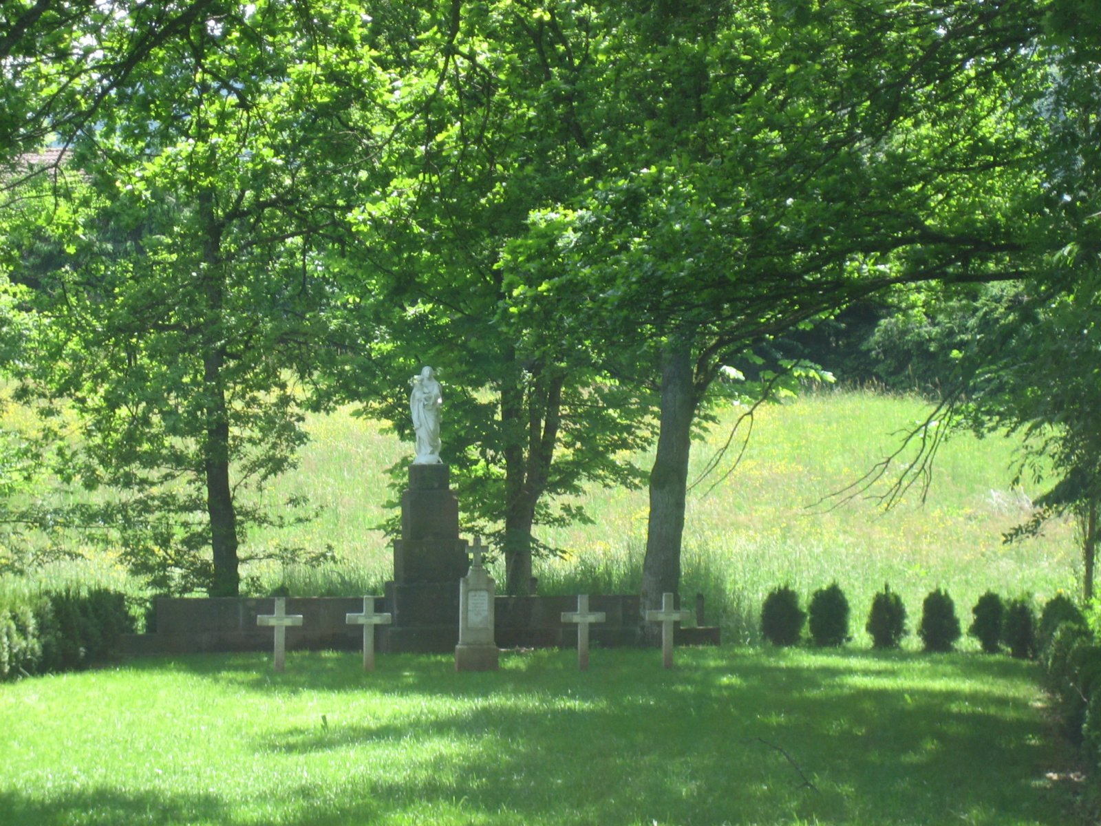 Cimetière aux cotés du monument aux morts de Nompatelize (France)